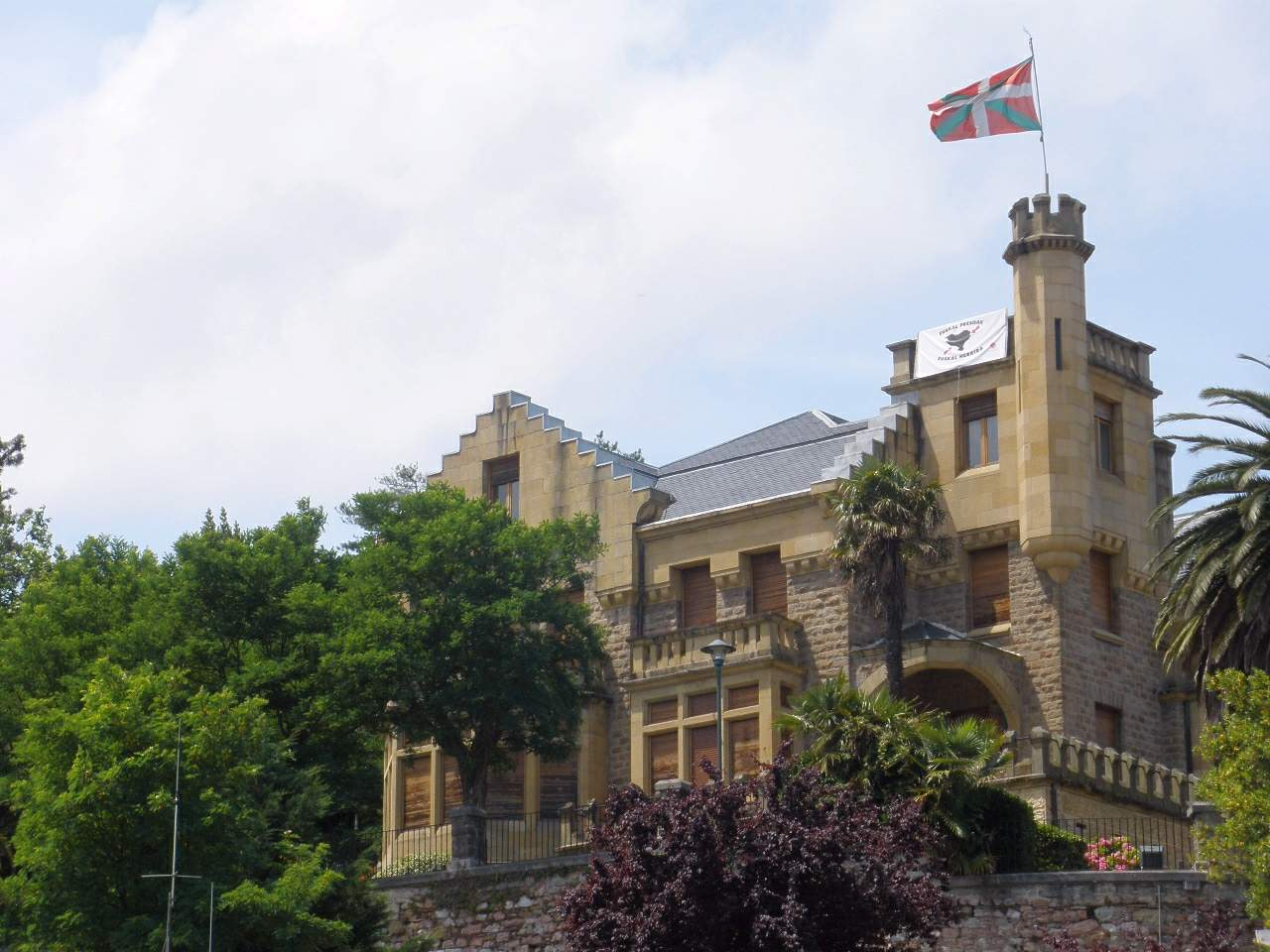 Zumaia (Gipuzkoa)